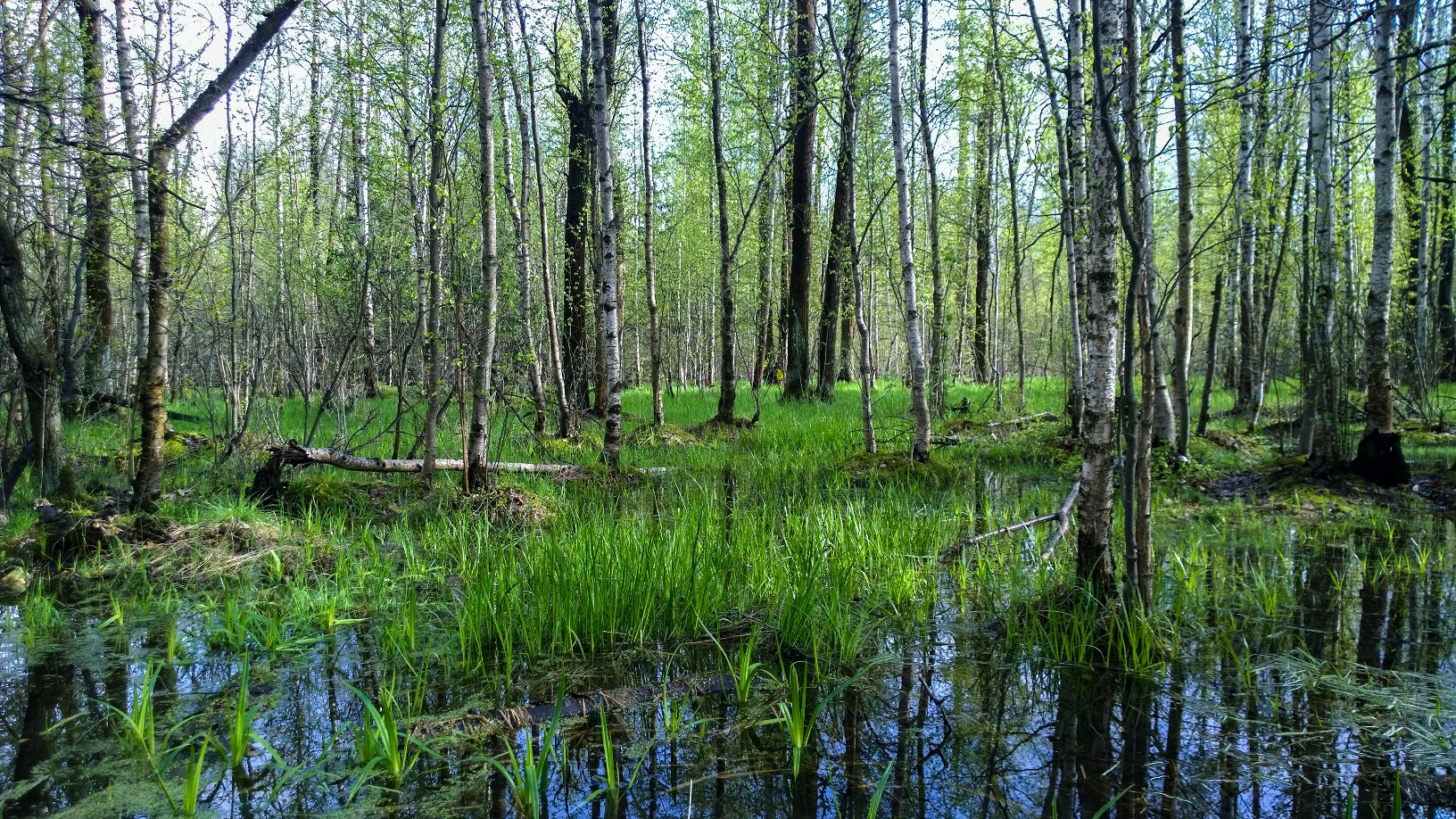 Лосиный остров: Национальный парк "Лосиный остров" расположен к северо-востоку от Москвы, при этом третья его часть находится в административных границах города, и его леса начинаются всего в 8 км от Кремля. Территория национального парка "Лосиный остров" расположена между 55°47’ и 55°55’ с.ш. и 37°40’ и 38°01’ в.д. Национальный парк "Лосиный остров" входит в юго–западную часть Московской впадины, расположен на границе Клинско–Дмитровской гряды и Мещерской низменности, известной под названием Московской Мещеры. Национальный парк занимает водоразделы рек Клязьмы, Яузы и Пехорки, Восточный округ, Москва This image is related to the protected area of Russia number 7700174